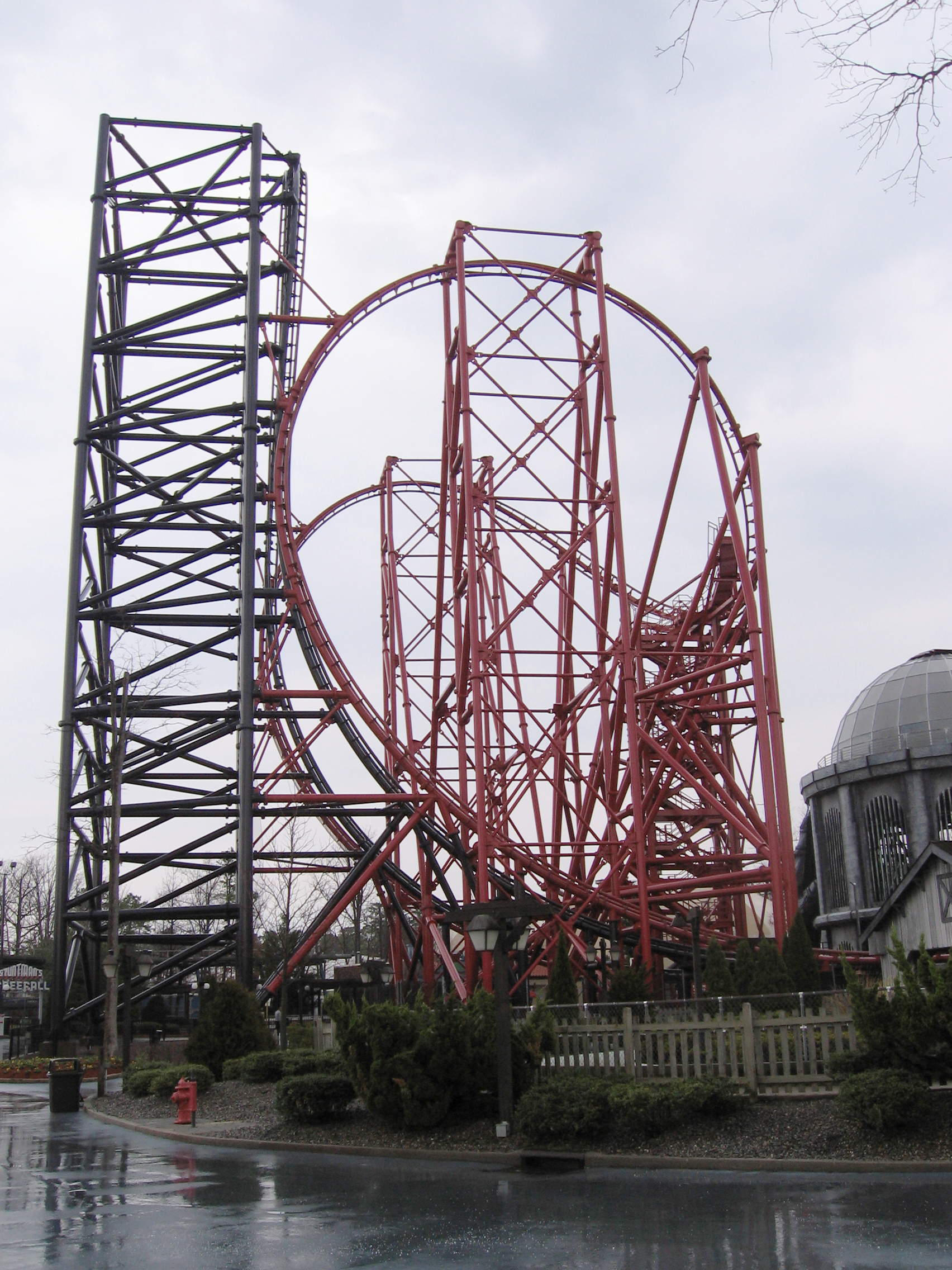 Took it myself. Dusso Janladde 04:45, 2 April 2006 (UTC)